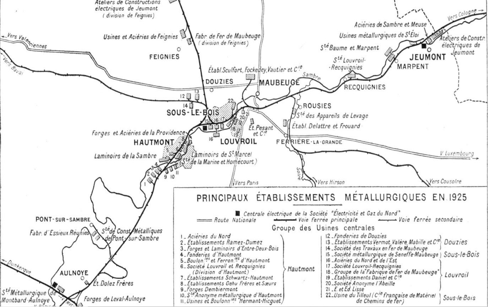 principaux établissement métallurgiques en 1927 autour de Maubeuge